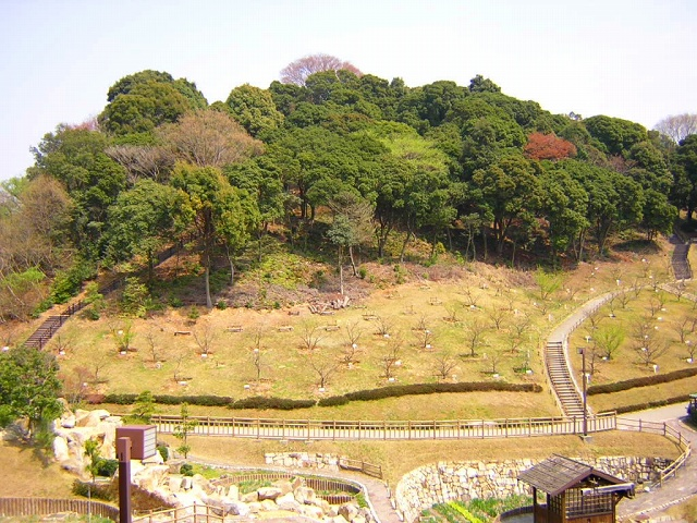 弘法山側から見た赤塚山